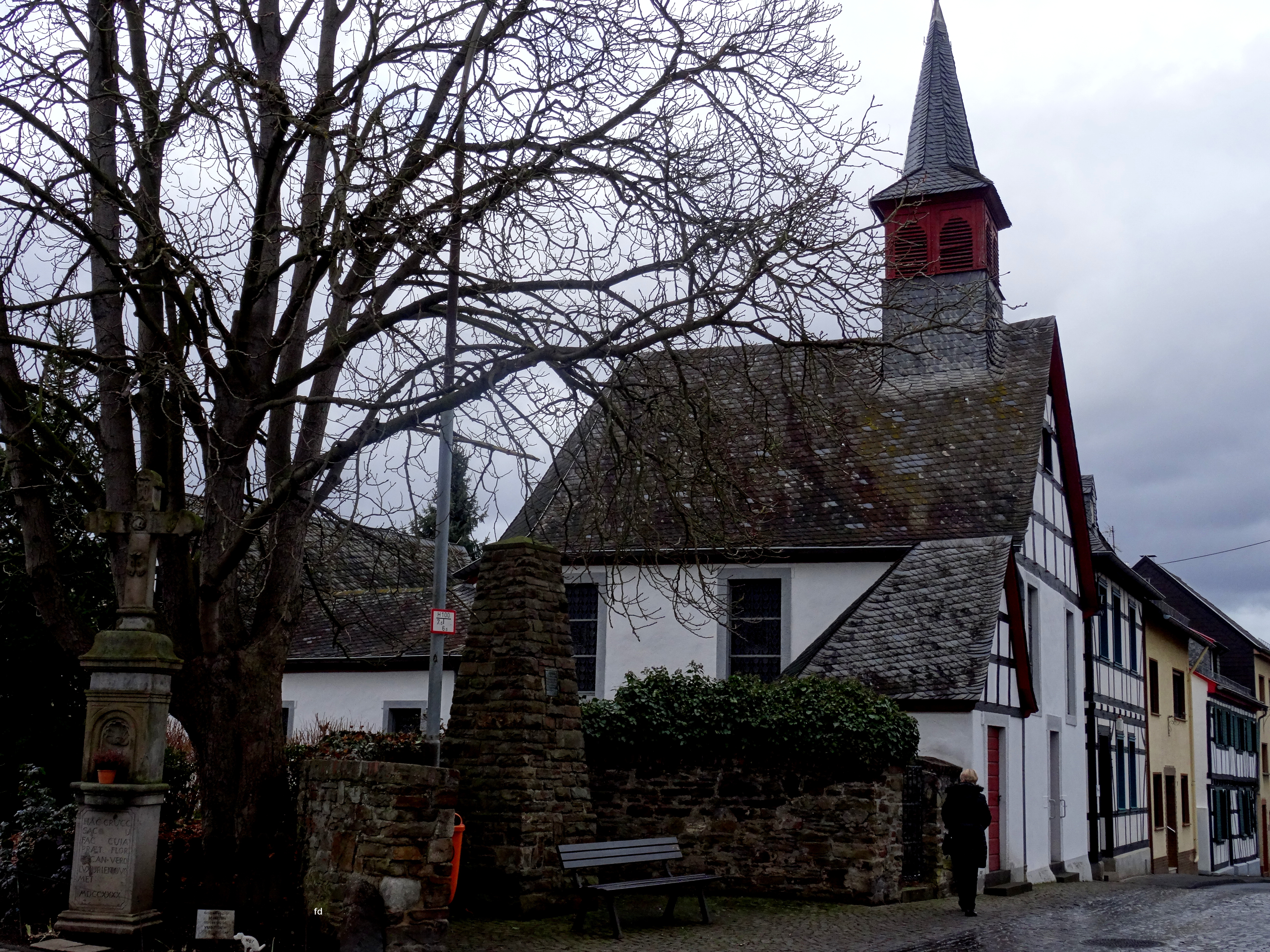 Gedenkstein an eine Separatistenschlacht im Siebengebirge an der Leonarduskapelle in Rheinbreitbach.